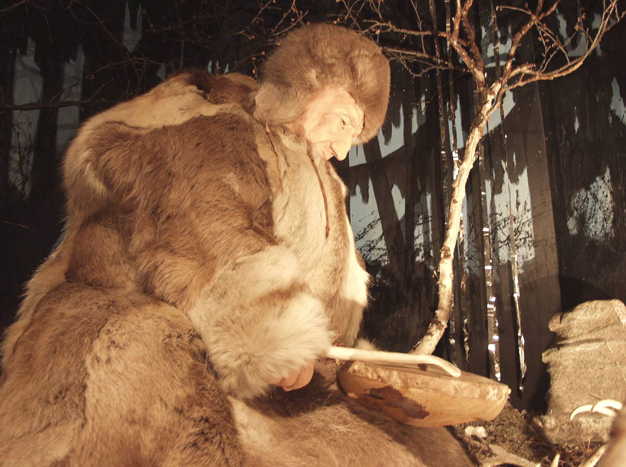 Saami Schamane in einem Museum in Schweden (vermutlich Jamtli, Östersund)